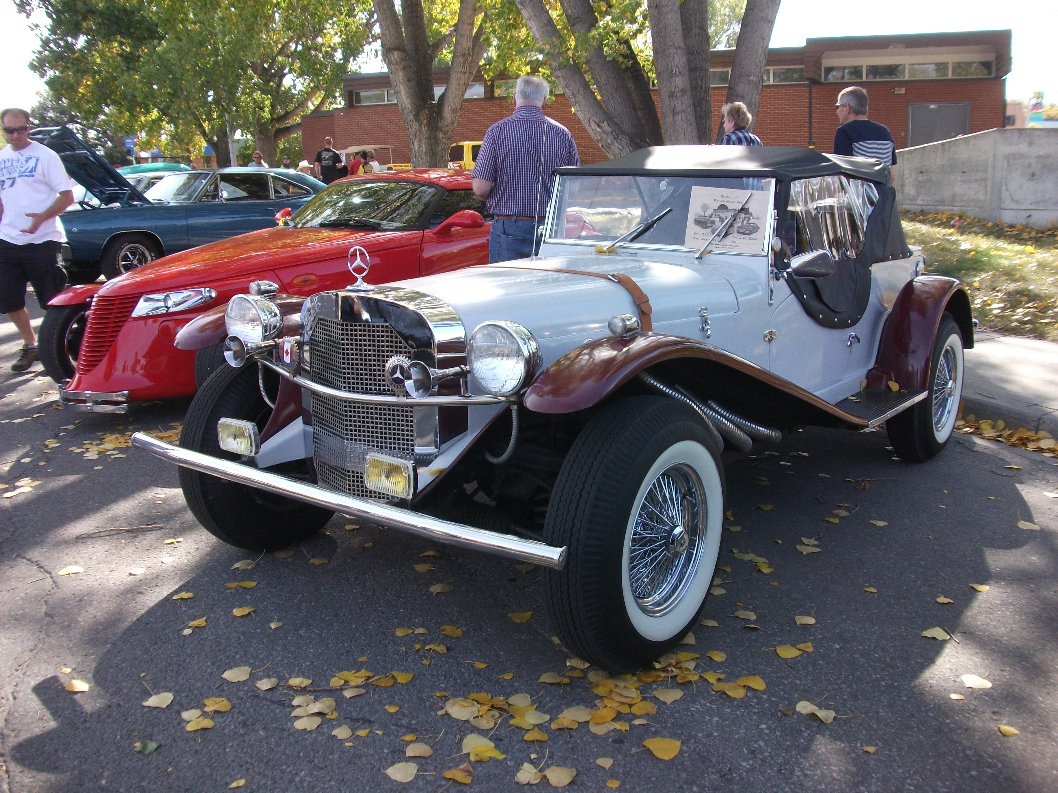 Gazelle "30s Mercedes Replica"